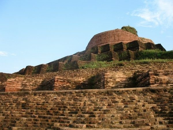 Kesariya, Champaran, Bihar, India